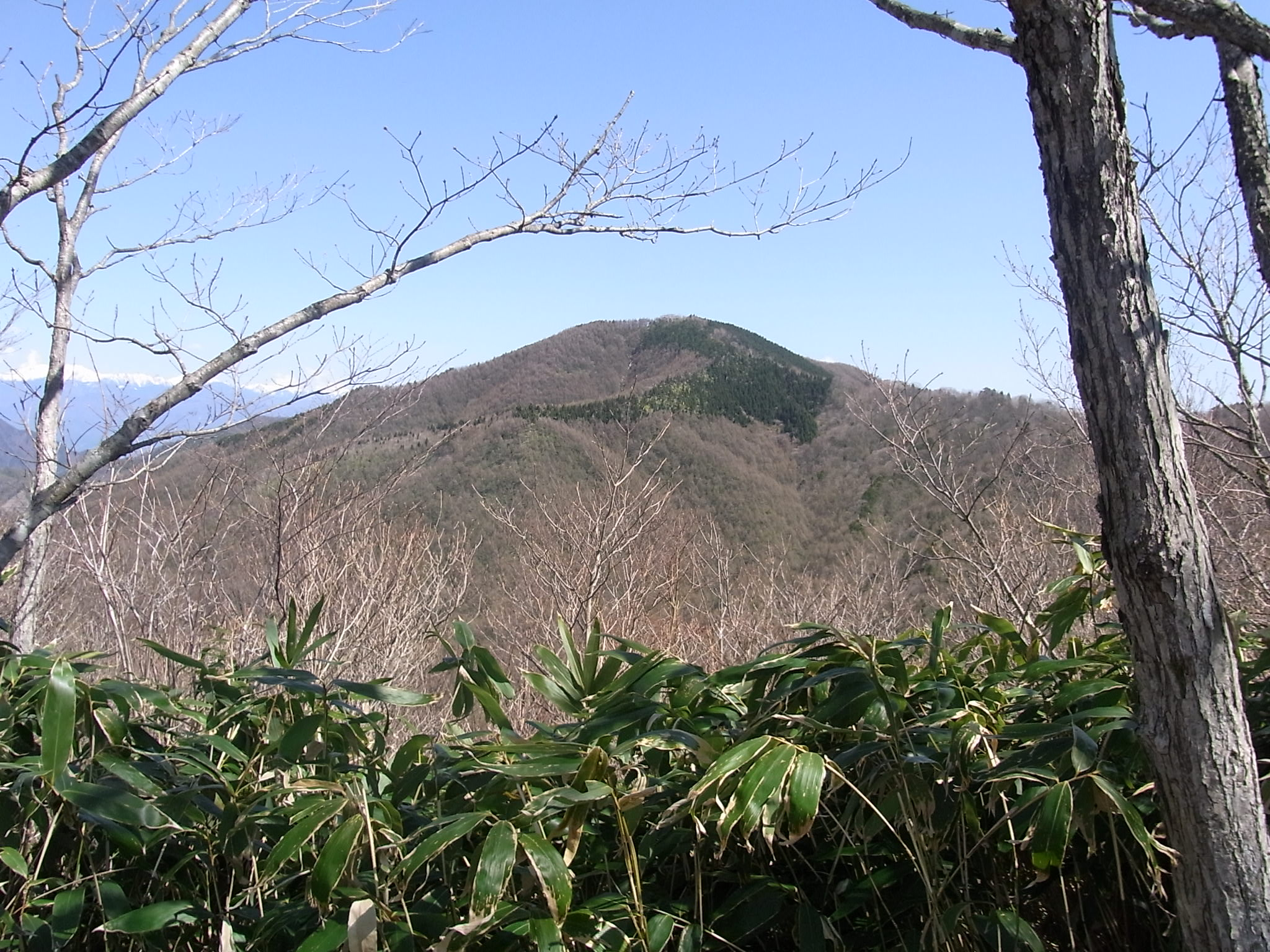 夏焼山付近より見る兀岳（はげだけ）